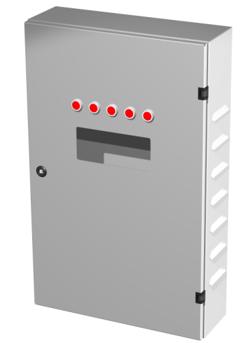 Beispiel eines kleinen Schaltschranks, sog. Klemmenkasten.